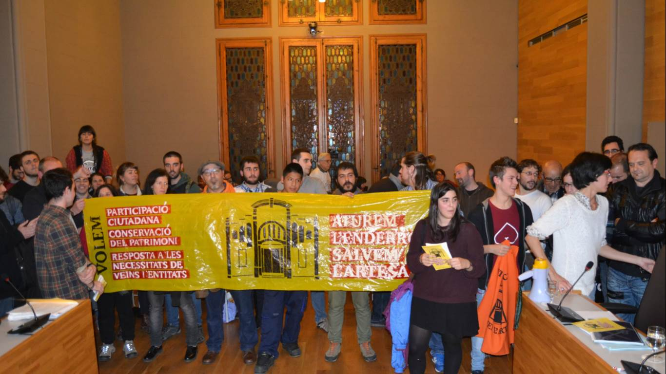 Grup de manifestants contra el projecte de l'Artesà al Ple del 14 de desembre de 2016